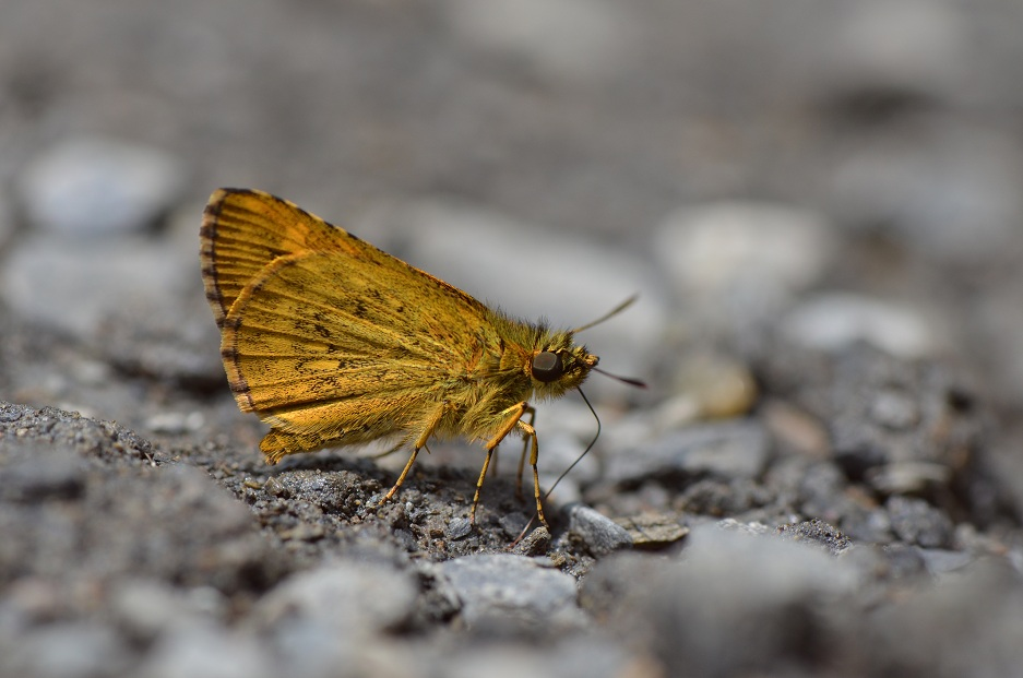 地點：台灣南投埔里南山溪